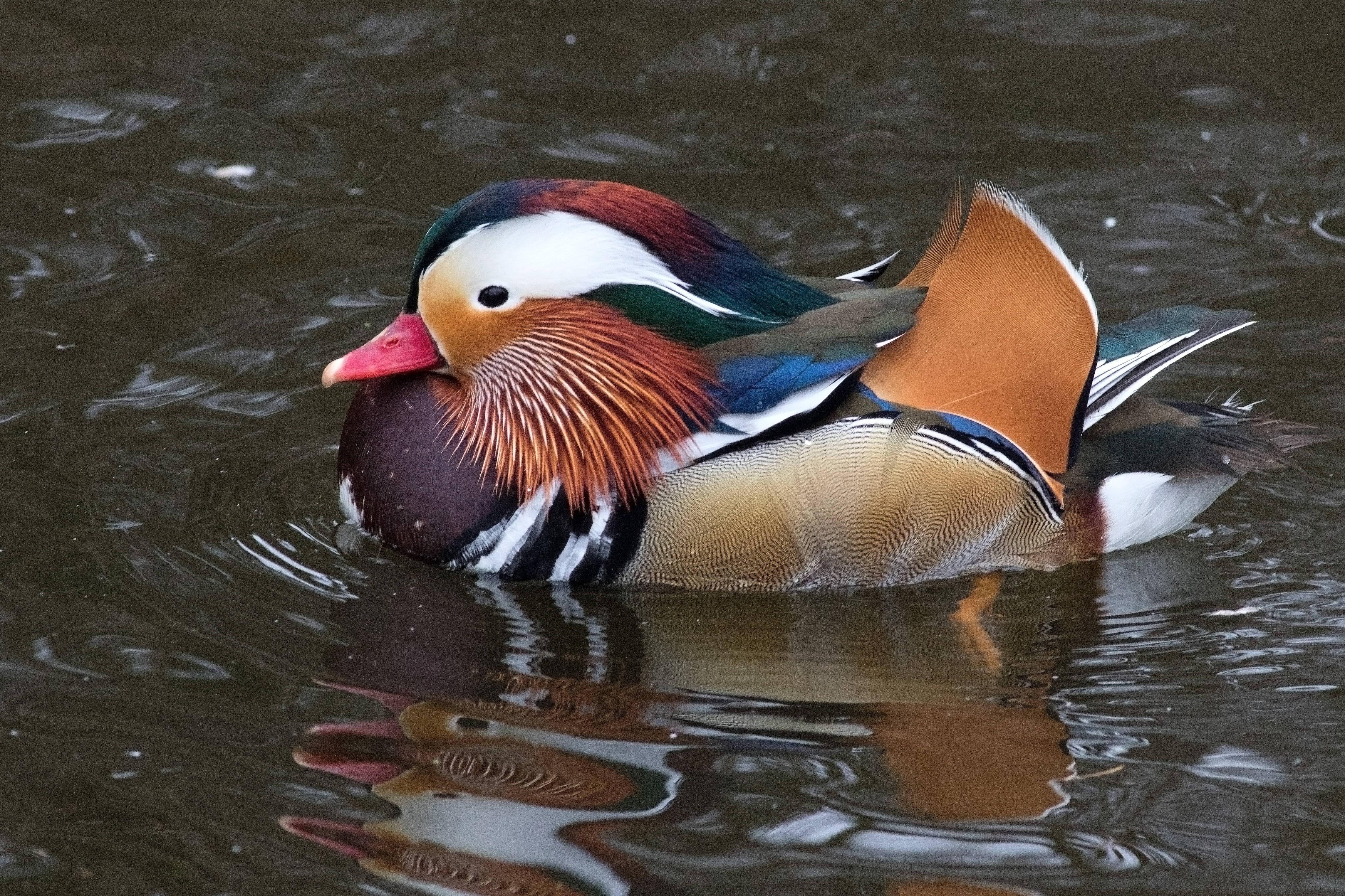 Mandarin Duck, Kellogg Biological Station, Kalamazoo, MI